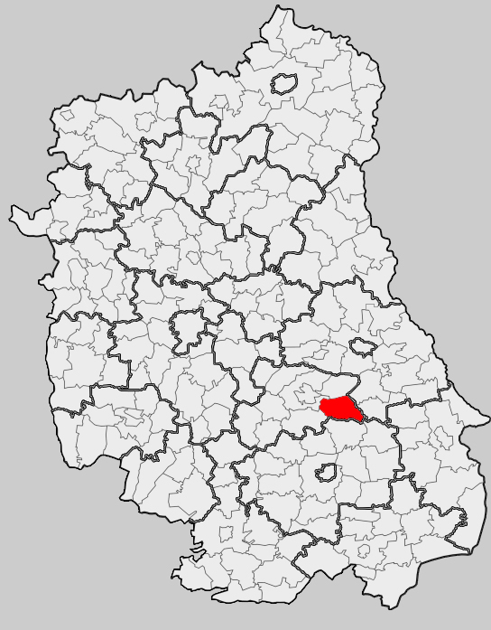 Map of gmina Kraśniczyn, Krasnystaw county, Lublin voivodship Mapa gminy Kraśniczyn, powiat krasnostawski, województwo lubelskie